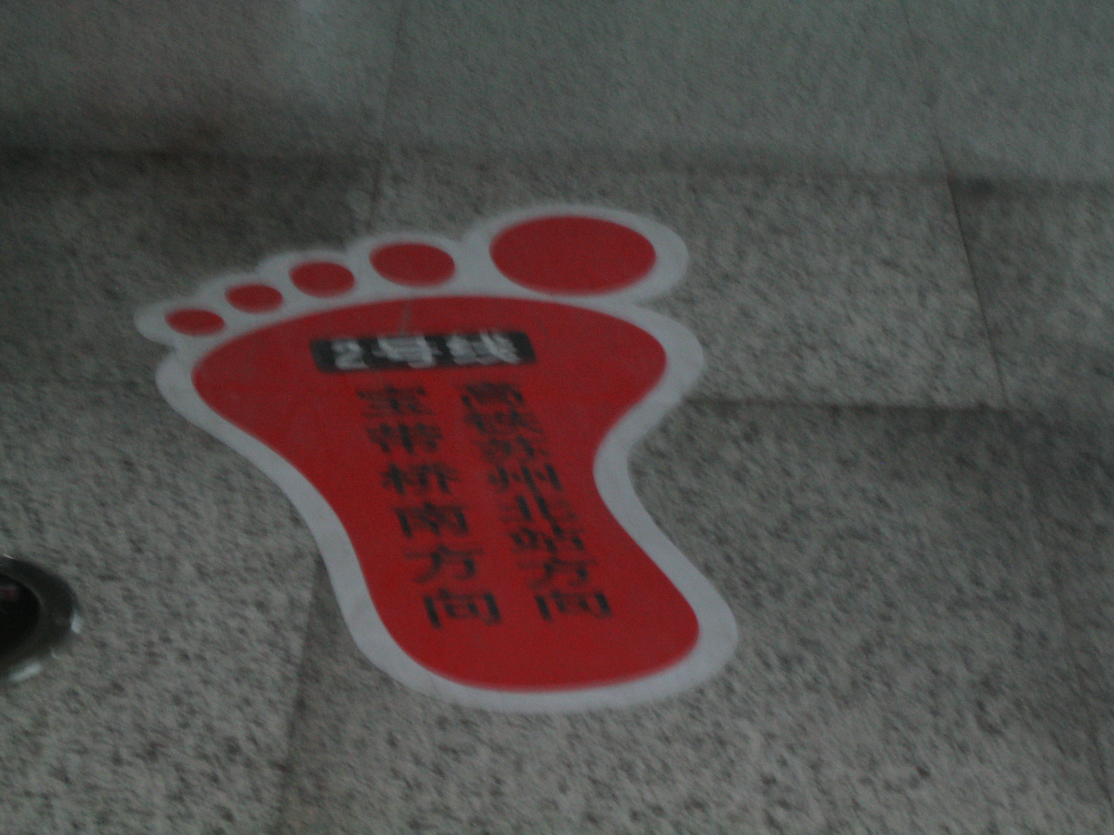 中文（中国大陆）: 苏州地铁广济南路站2号线站台上的小脚丫换乘指示